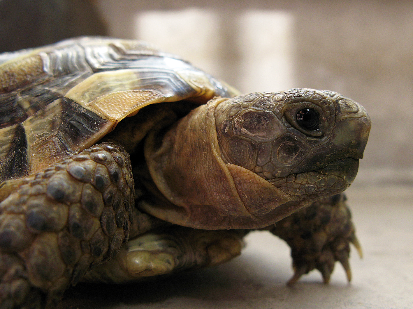 لاک‌پشتی در منطقه‌ی لواسانات تهران